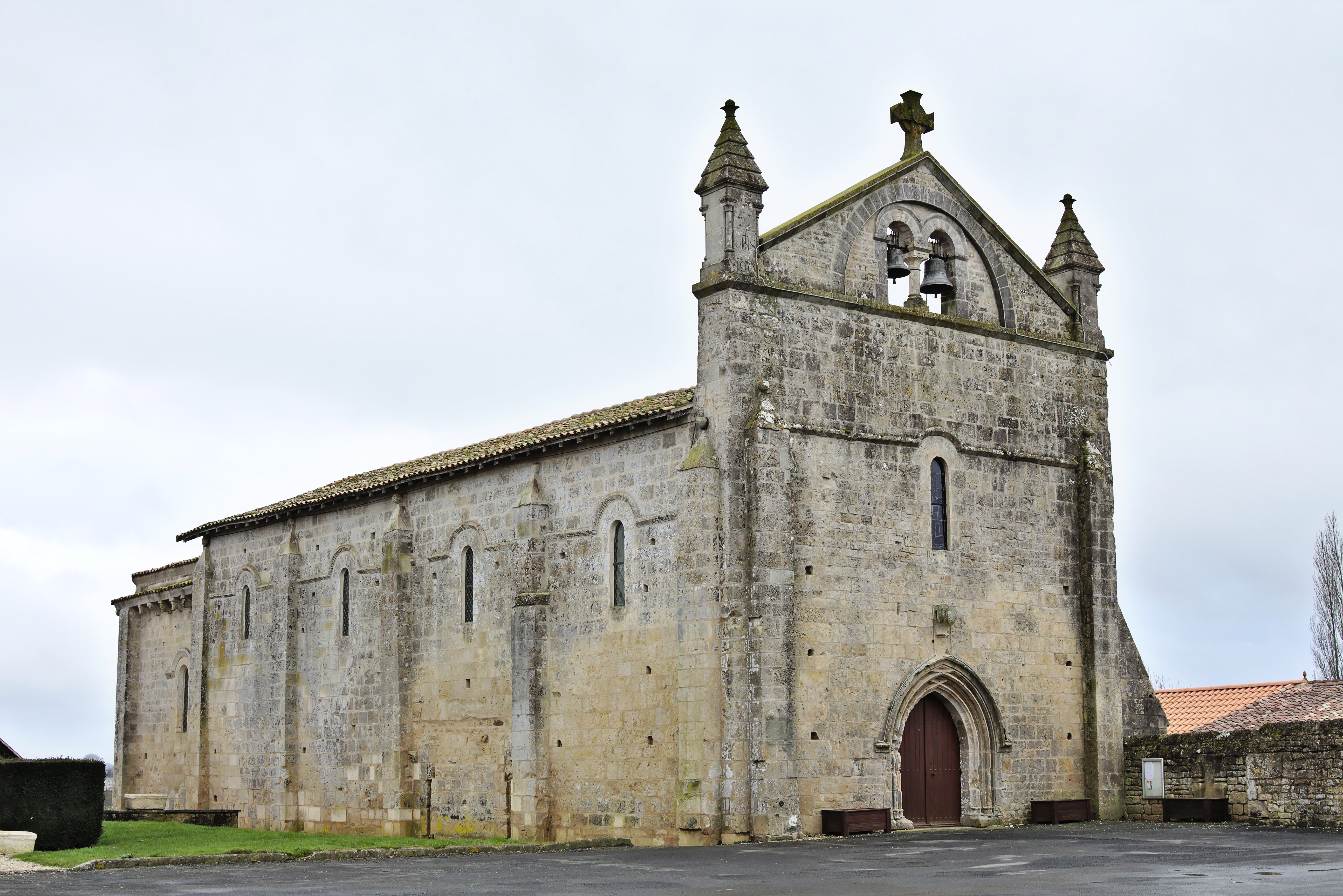 Église Saint-Léger-lès-Melle, Saint-Léger-de-la-Martinière